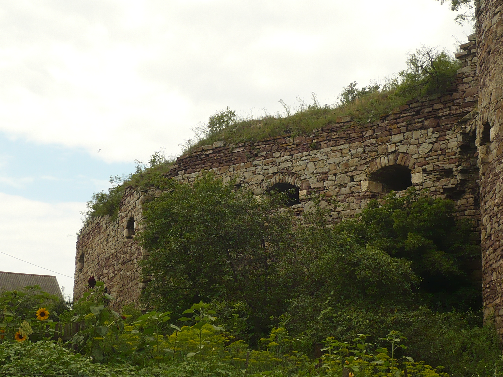 Buczacz.Zamek